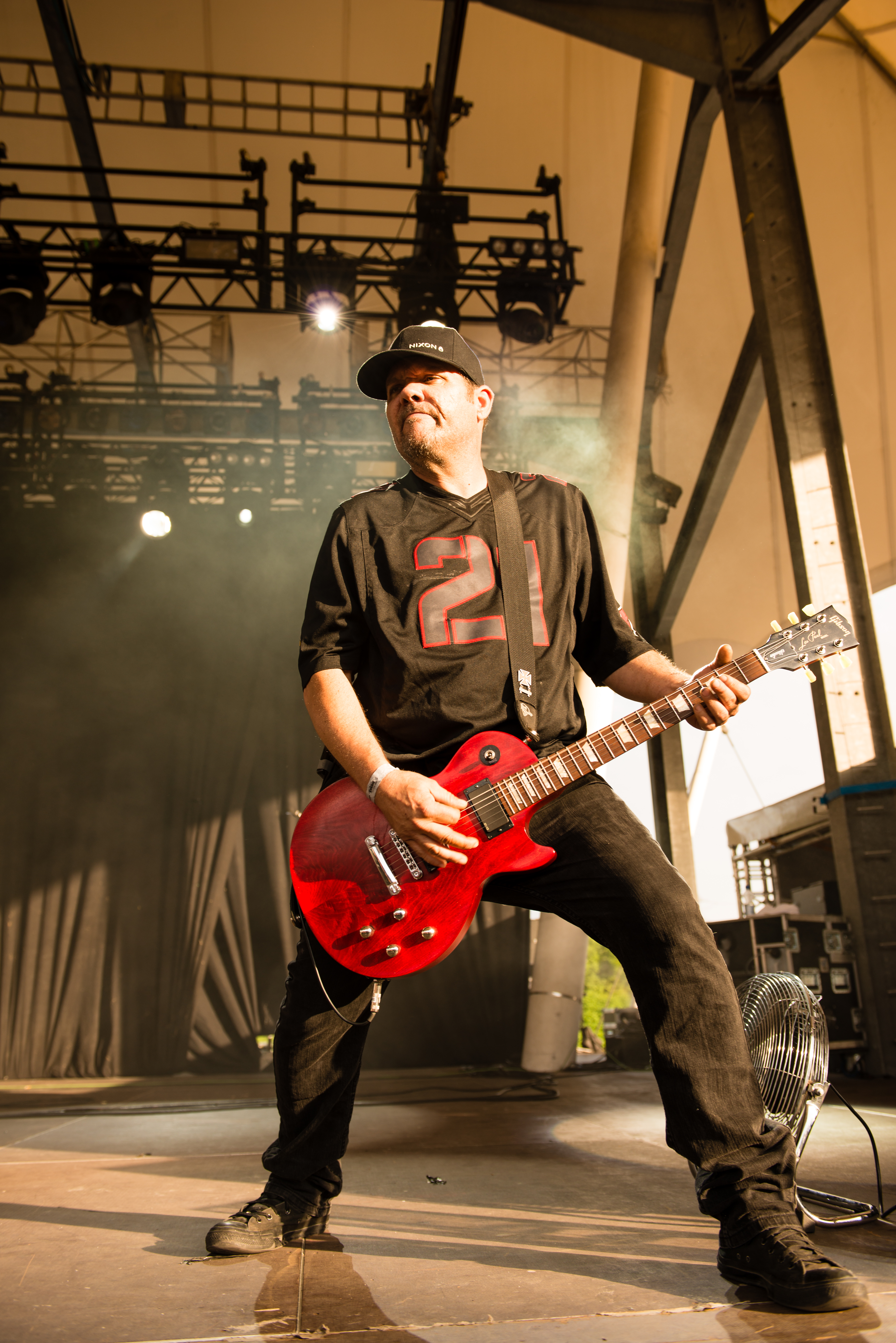 'Rock Hard Festival 2014 - Gelsenkirchen': 'Sacred Reich'